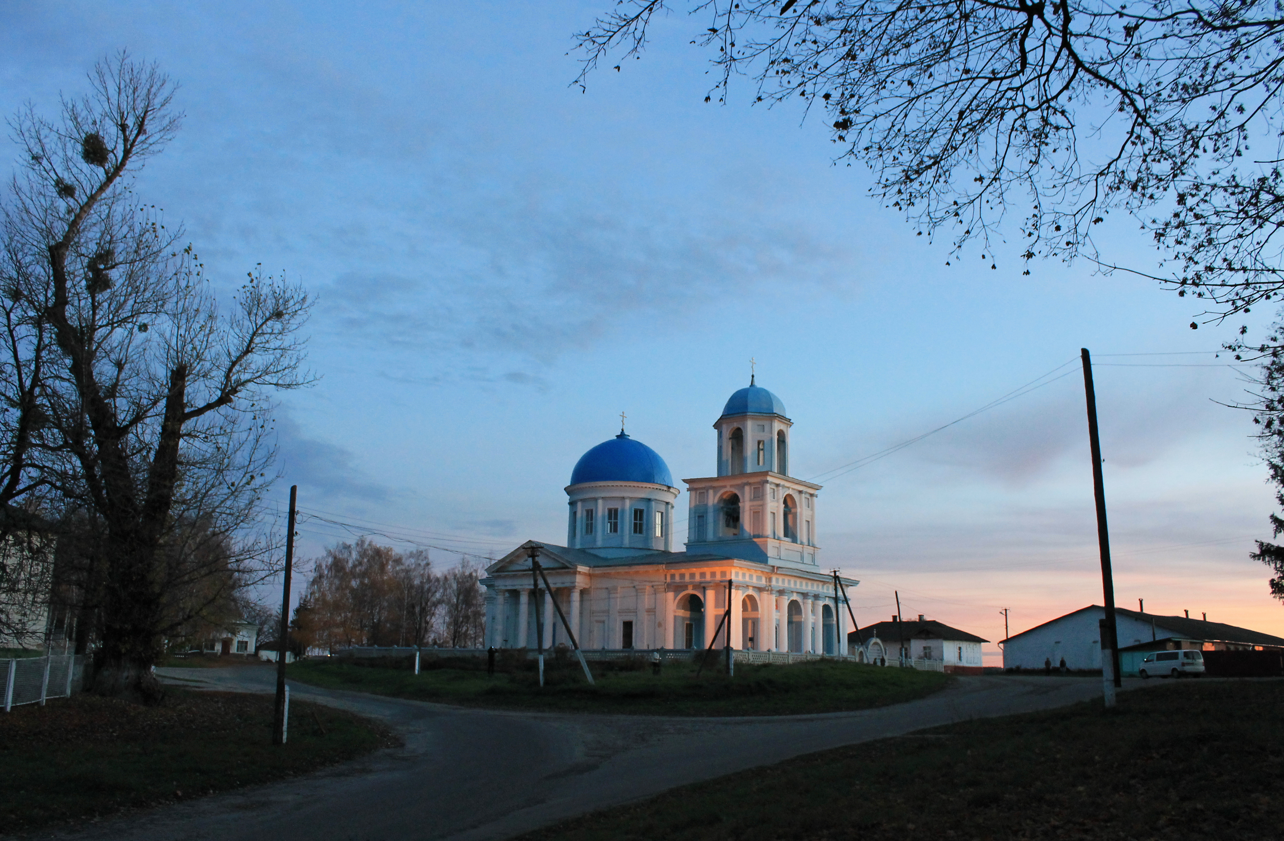 Воскресенська церква 1808р., с.Великий Бобрик, Краснопільського району, Сумської обл.